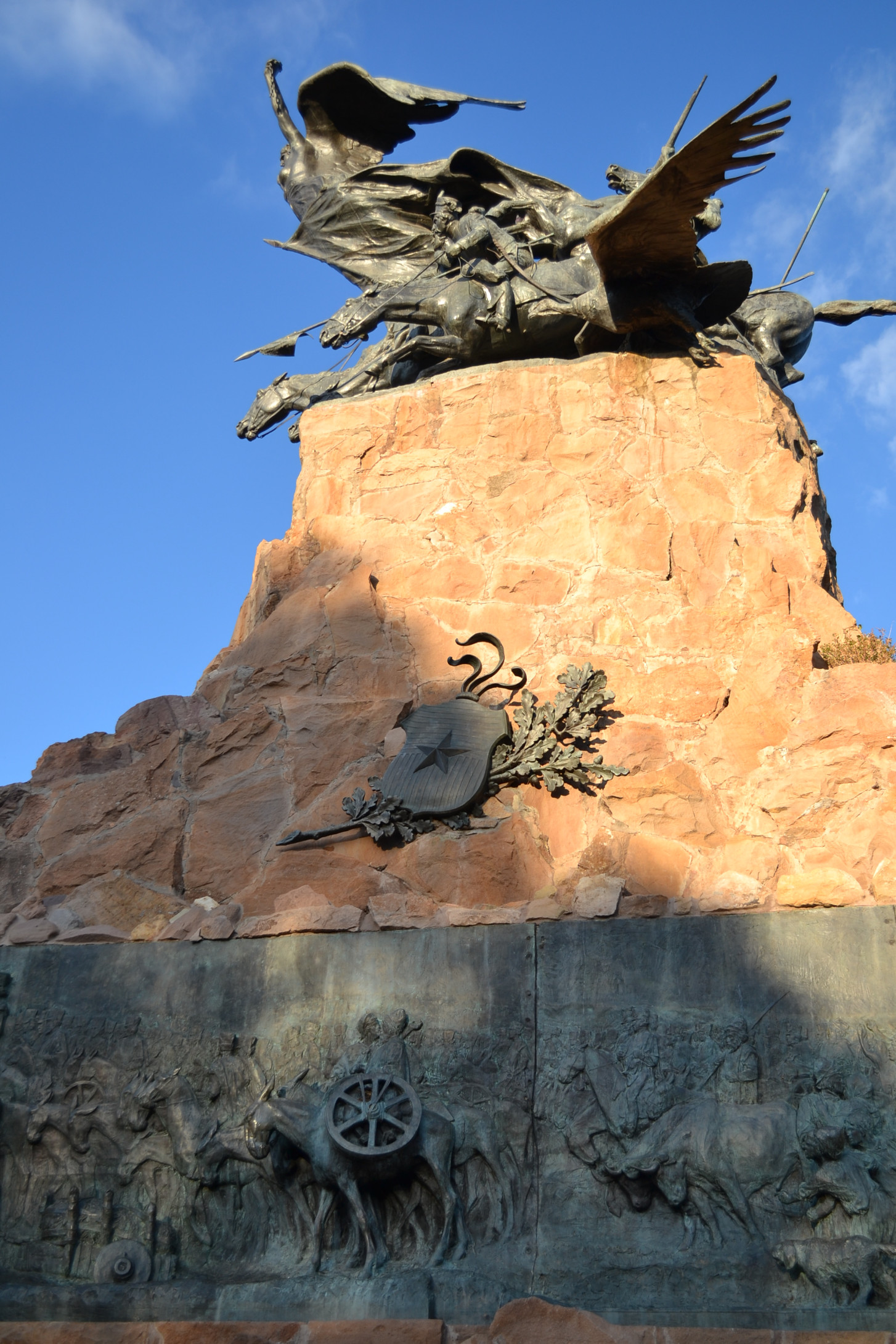 Monumento al Ejercito de los Andes (Cerro de la Gloria). Detalle. Vista completa lado Oeste